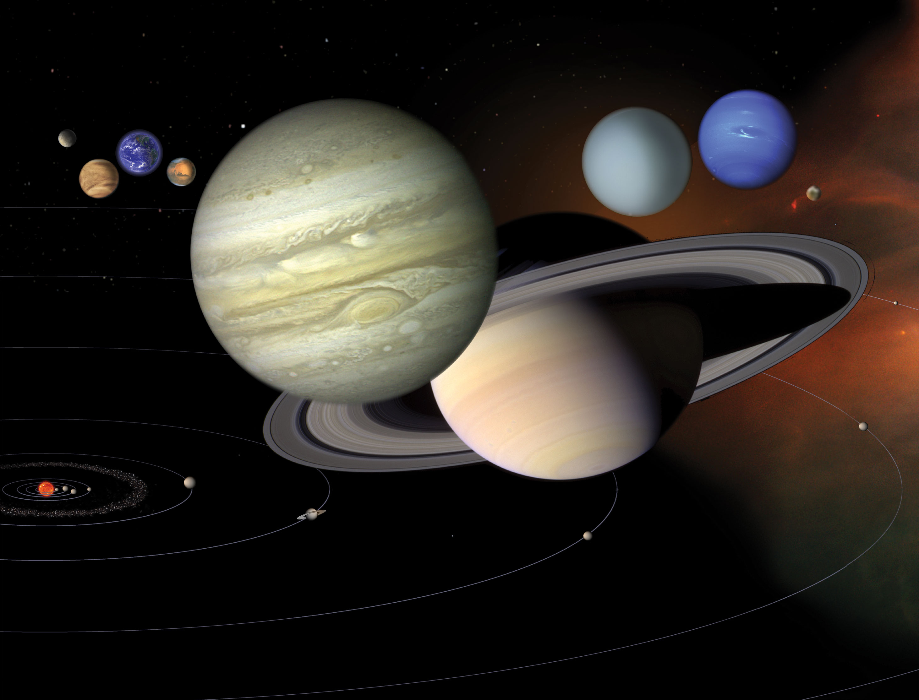 Montagem dos corpos do Sistema Solar, seus tamanhos e distâncias relativas